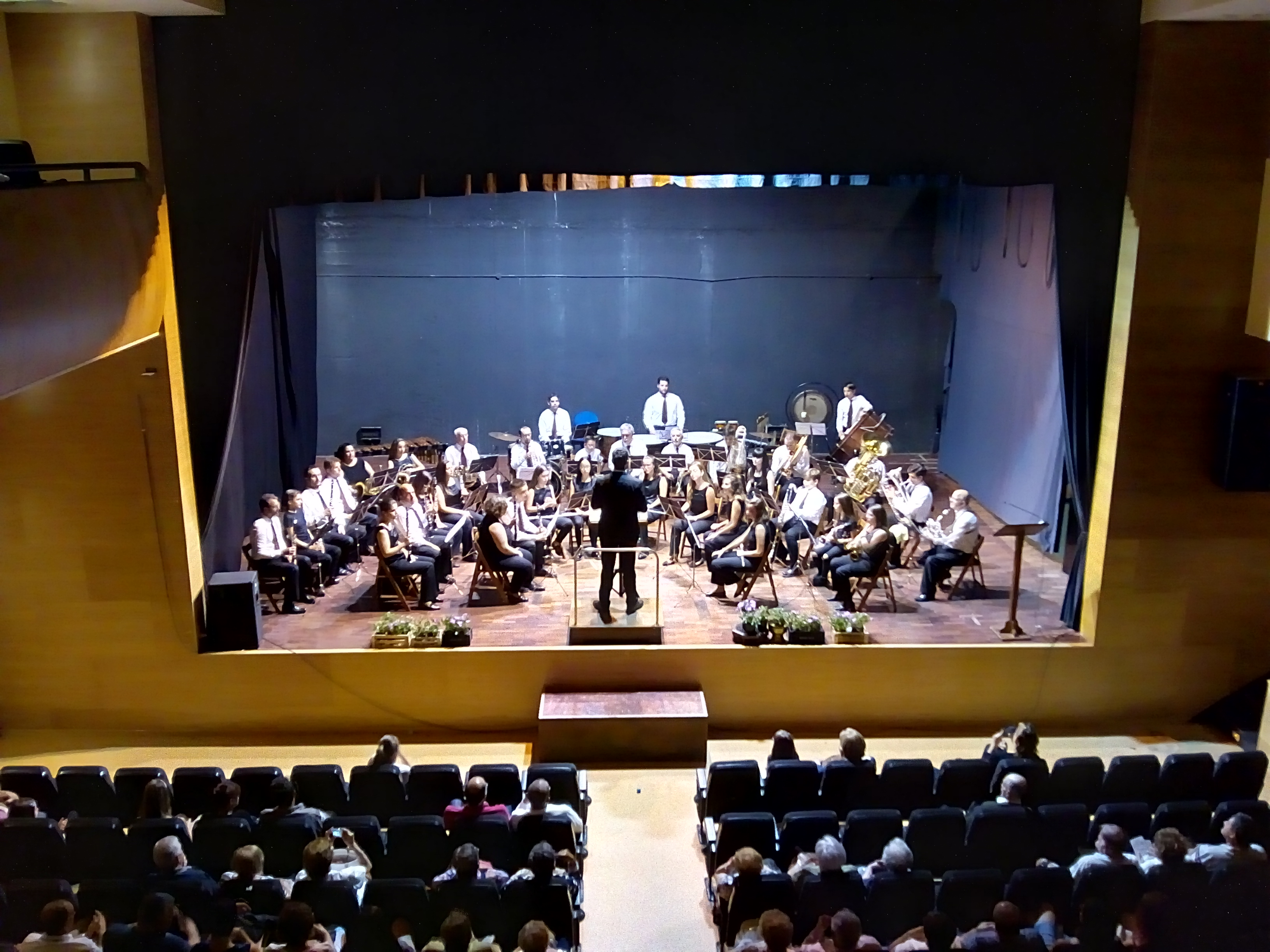 Actuación da Banda Sinfónica Municipal de Ribadeo o 20190810, no auditorio municipal de Ribadeo, no marco do festival de bandas de Ribadeo 2019